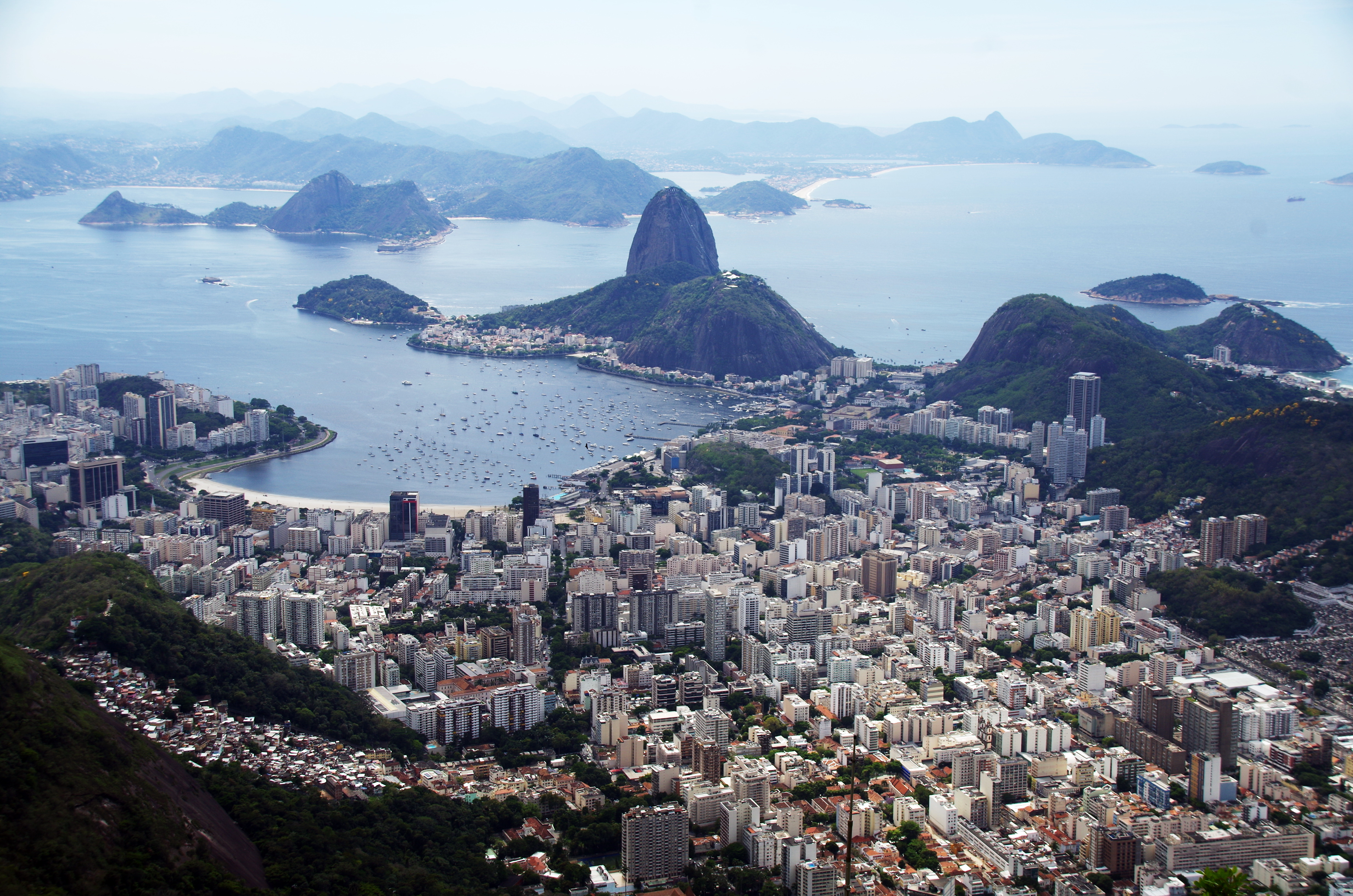 Blick vom Corcovado zum Zuckerhut